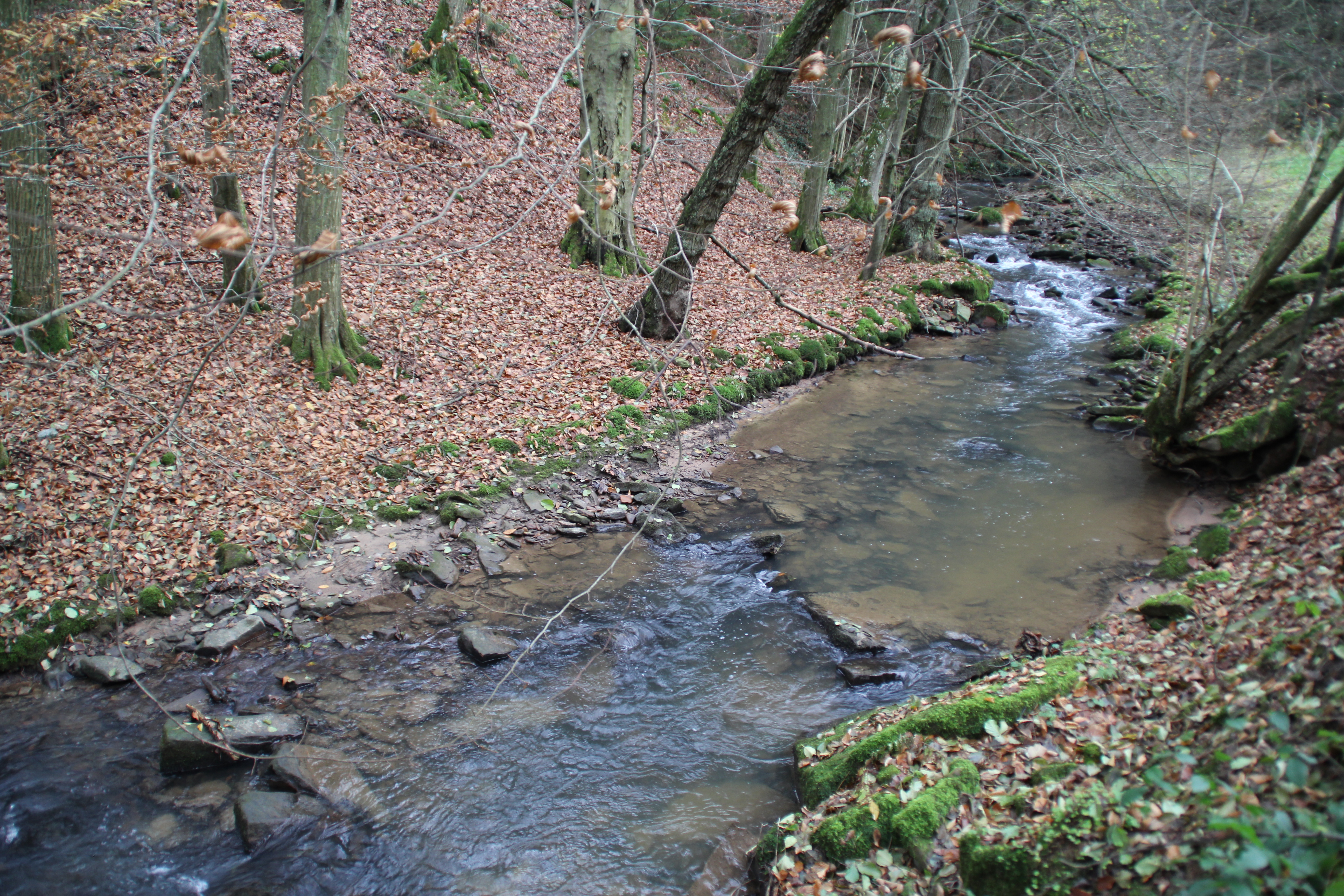 Der Brombach bei Zell im Odenwald